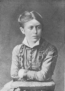 Vera Figner (1852-1942)